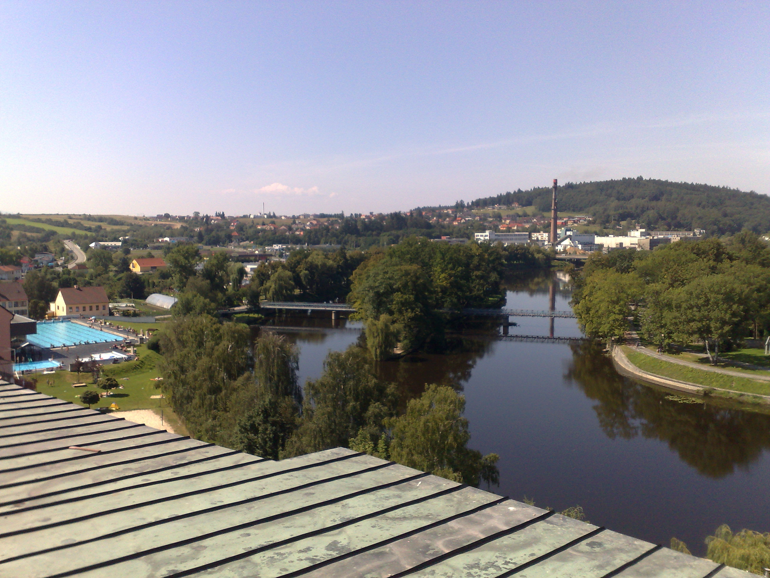 Pohled ze střechy od hotelu - Bílá růže na řeku.